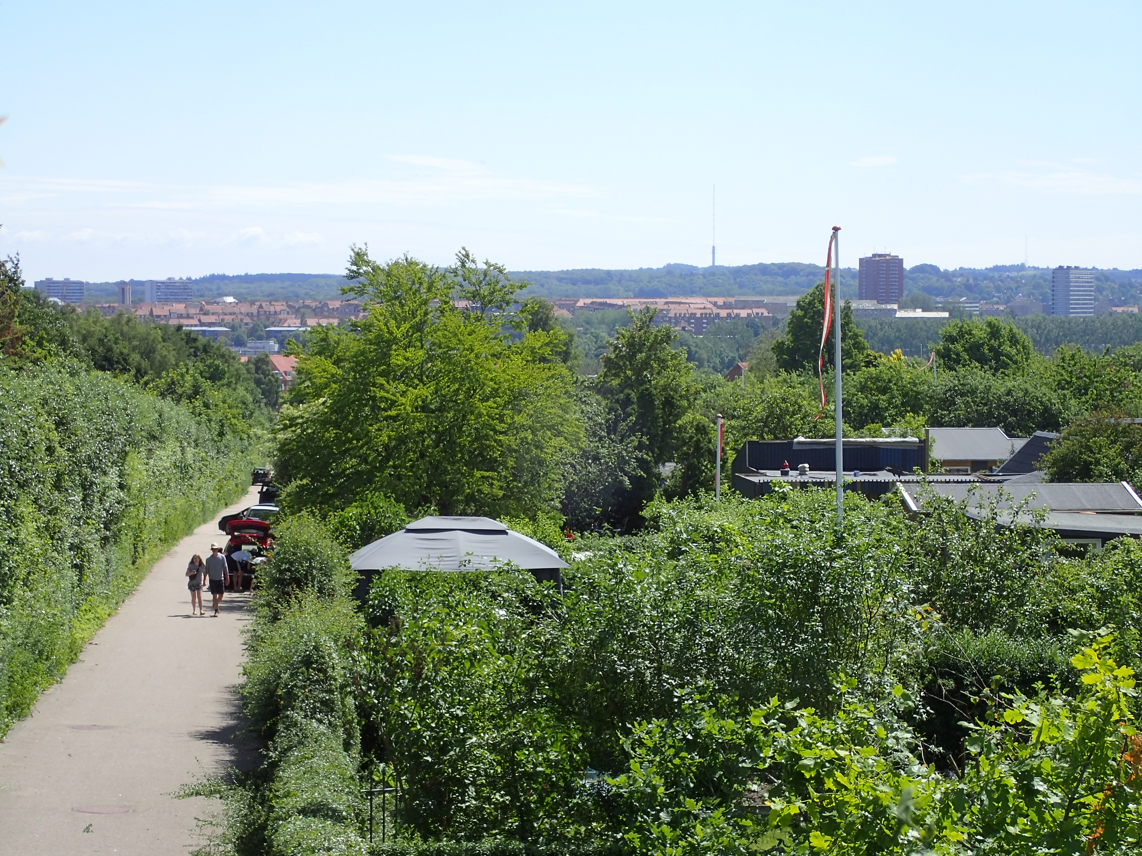 Udsyn over kolonihaverne Frydenlund, Solvangen og Oldjorden i Aarhus V. Det meste af området ligger i Åbyhøj.